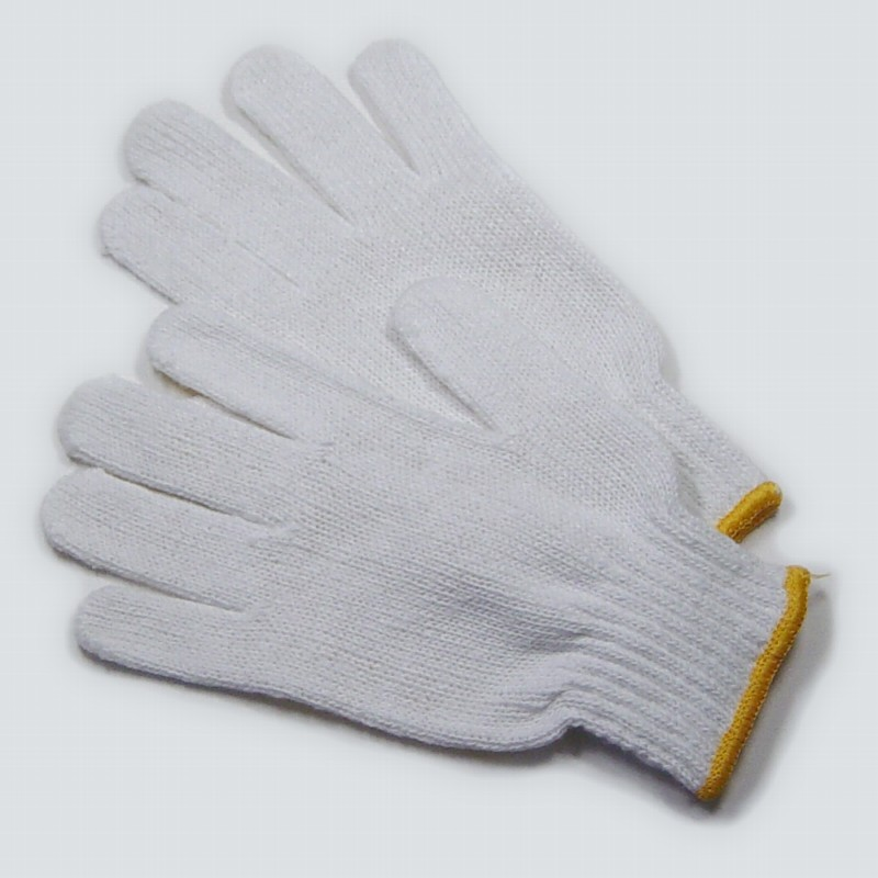 Gunte (軍手)